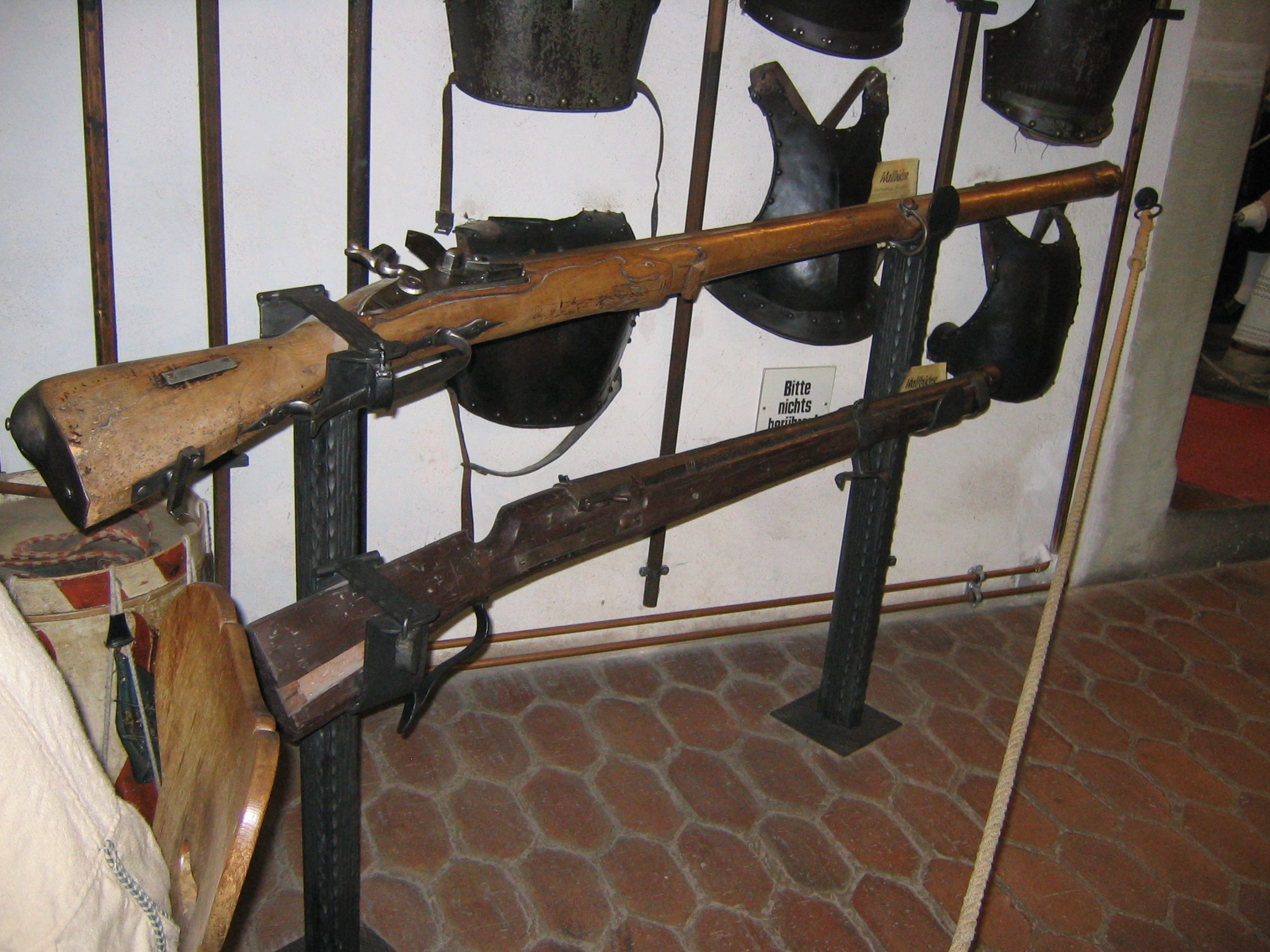 aufgenommen im Historiengewölbe und Staatsverlies von Rothenburg ob der Tauber, Deutschland